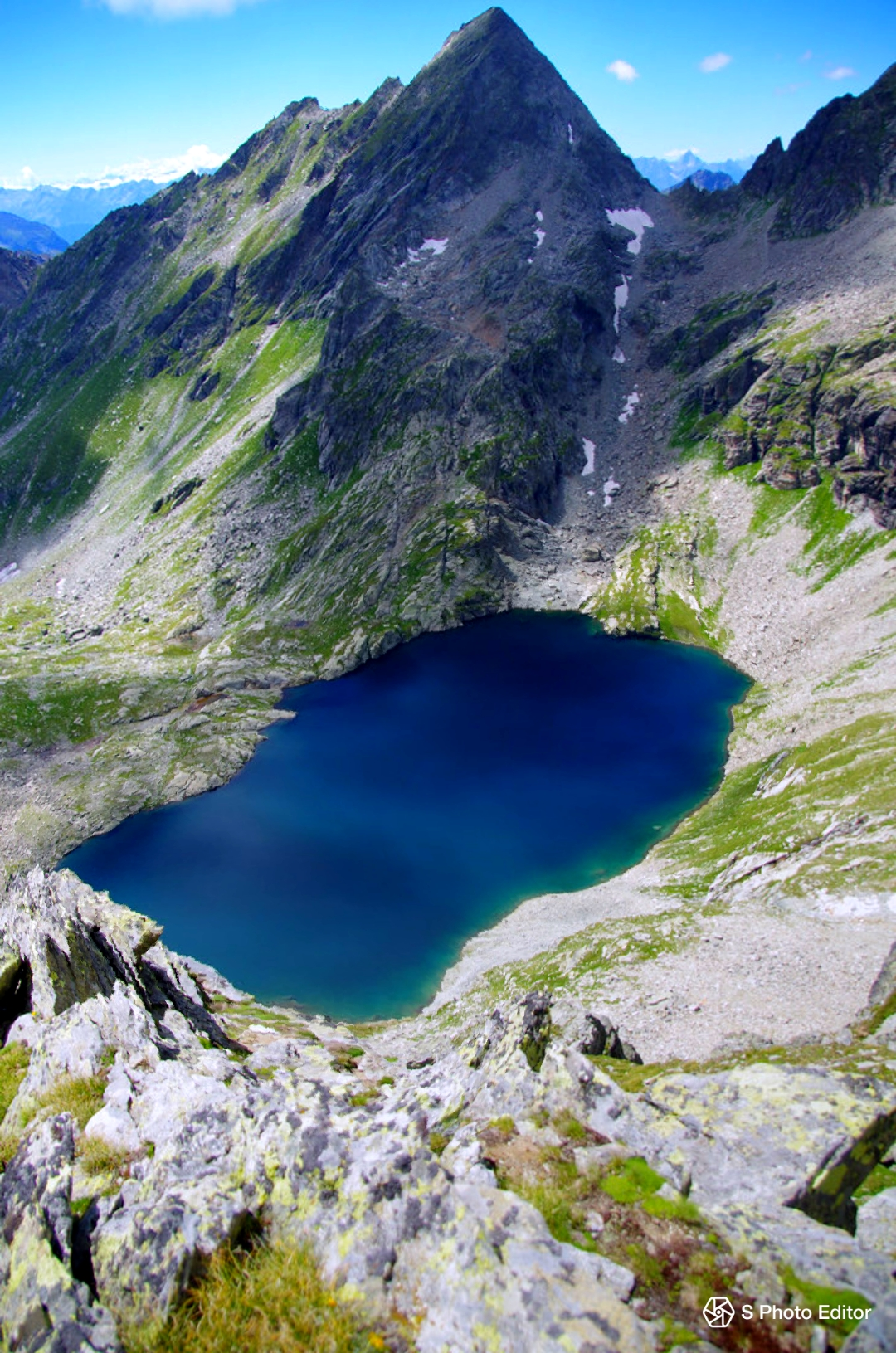 Lago a 2600 metri in val Vogna